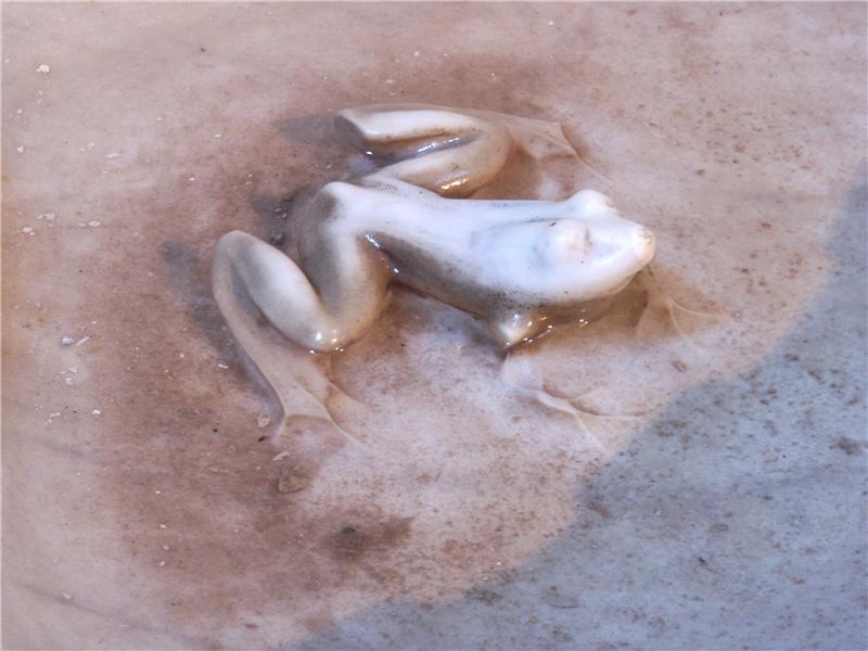 Narbonne (Aude, France), grenouille du bénitier de la basilique saint Paul.